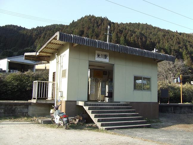 JR米川駅舎